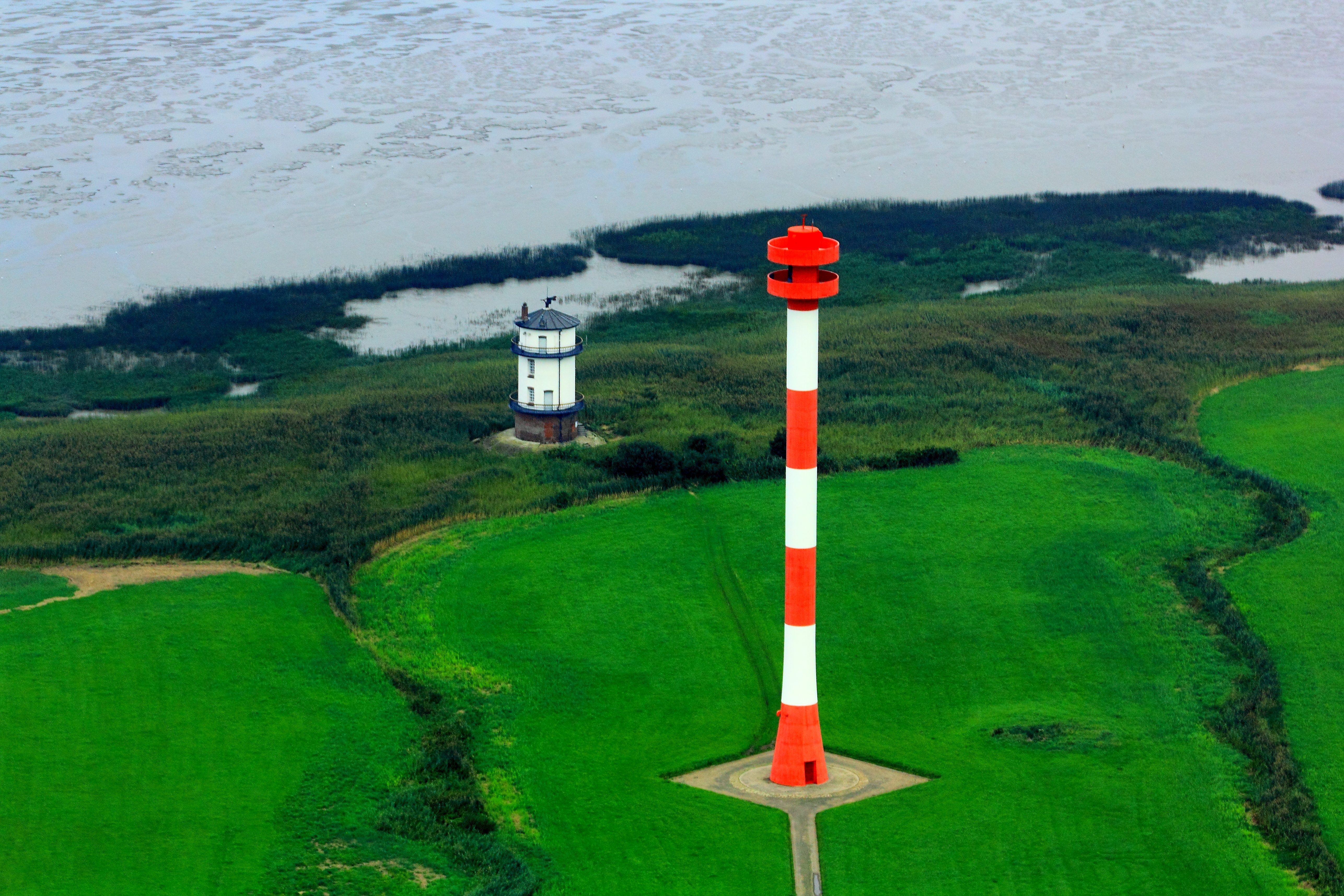 Leuchttürme Balje an der Niederelbe Dieses Foto entstand aufgrund eines Projektes, das von Wikimedia Deutschland e. V. gefördert wurde. Im Rahmen des „Community-Projektbudgets“ sollen Luftbilder u.a. von Inseln, Halligen, Sanden und Küstenstädten der deutschen Nordseeküste angefertigt werden. Das Projekt „Fotoflüge“ wurde im September 2011 begonnen.